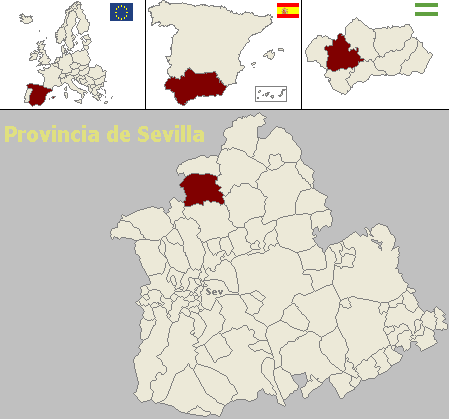 Mapa de localización del municipio sevillano de Almadén de la Plata (Andalucía, España)